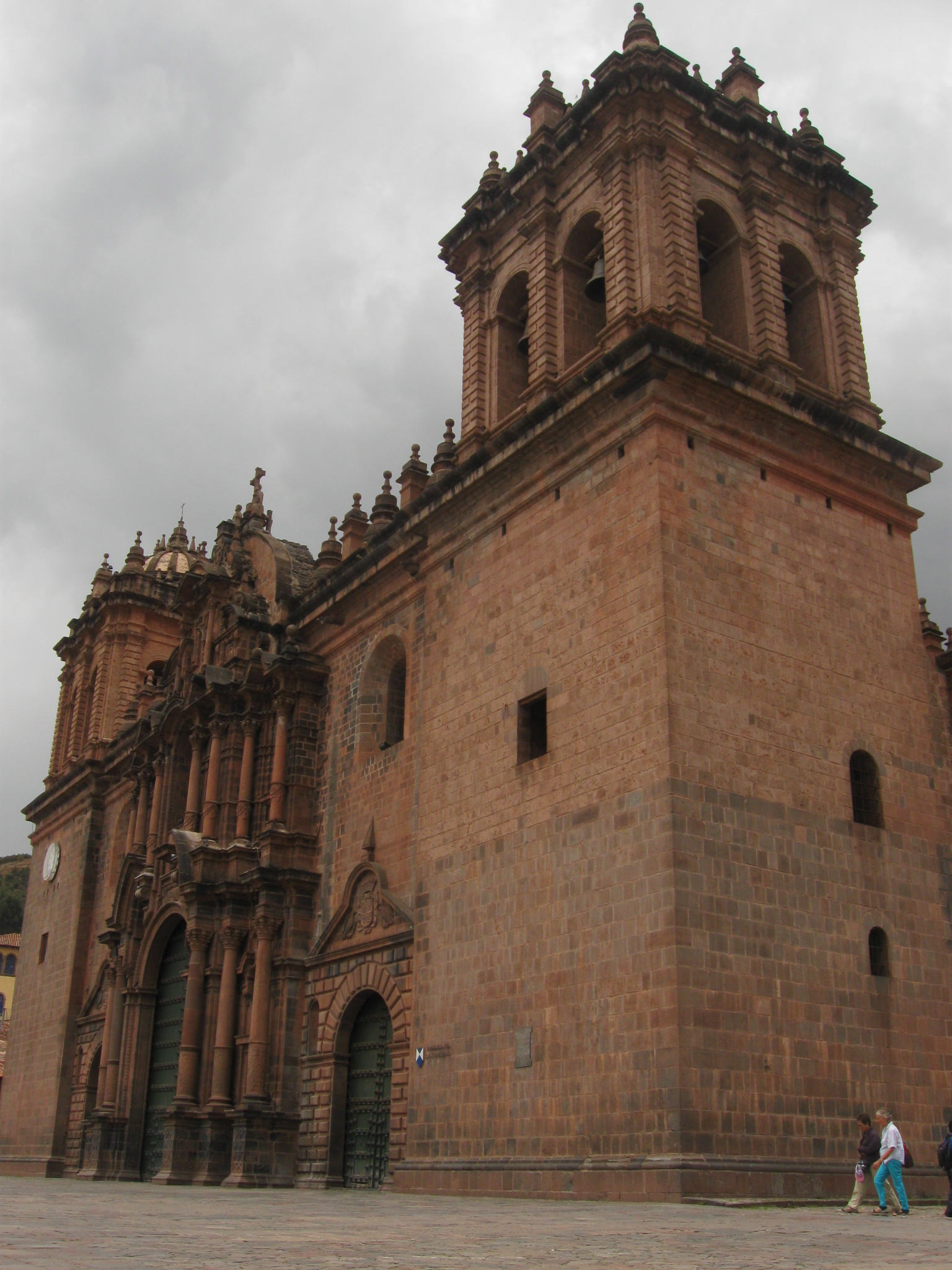 Vista parcial de la Catedral